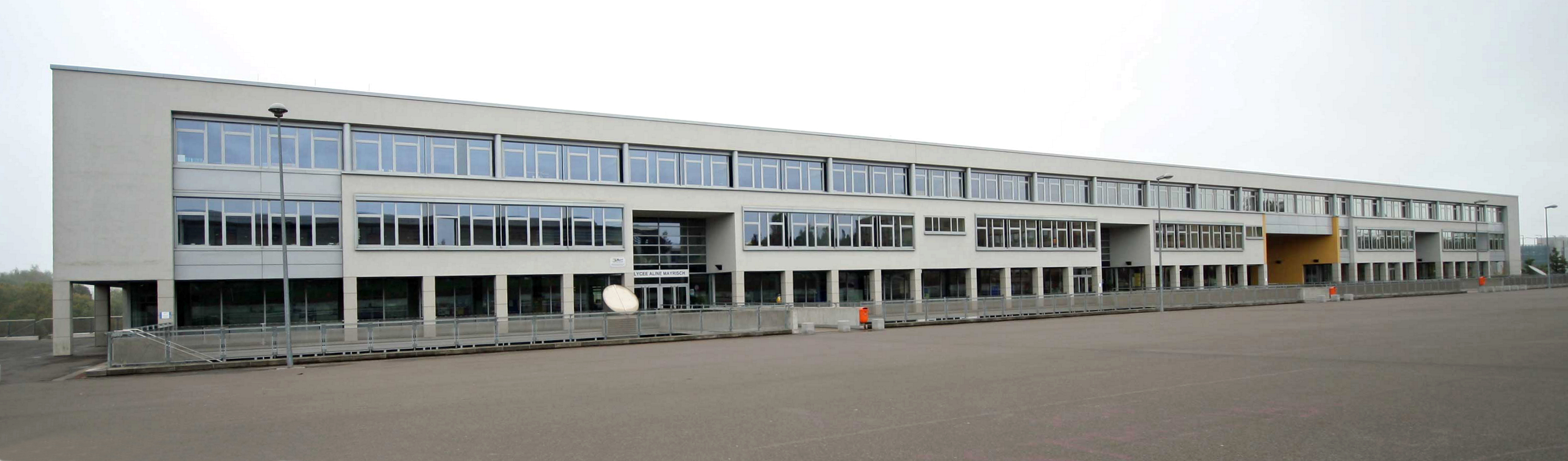 LAML.